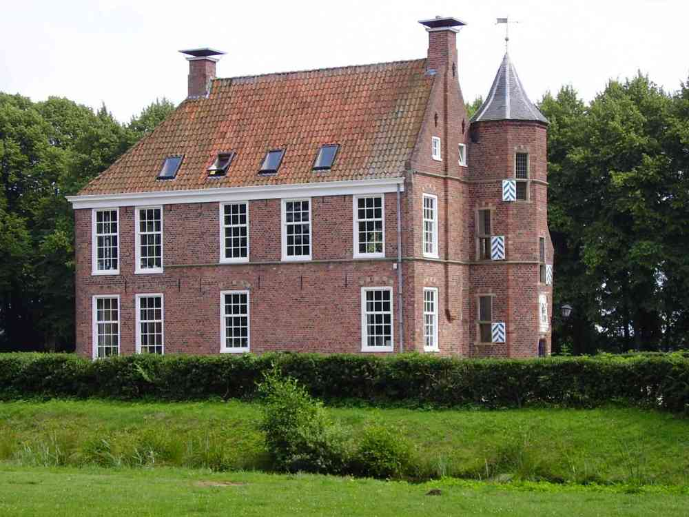 De Wedderborg, eigen foto van Marco Roepers, genomen op 3 juli 2005. Categorie:Afbeelding borg